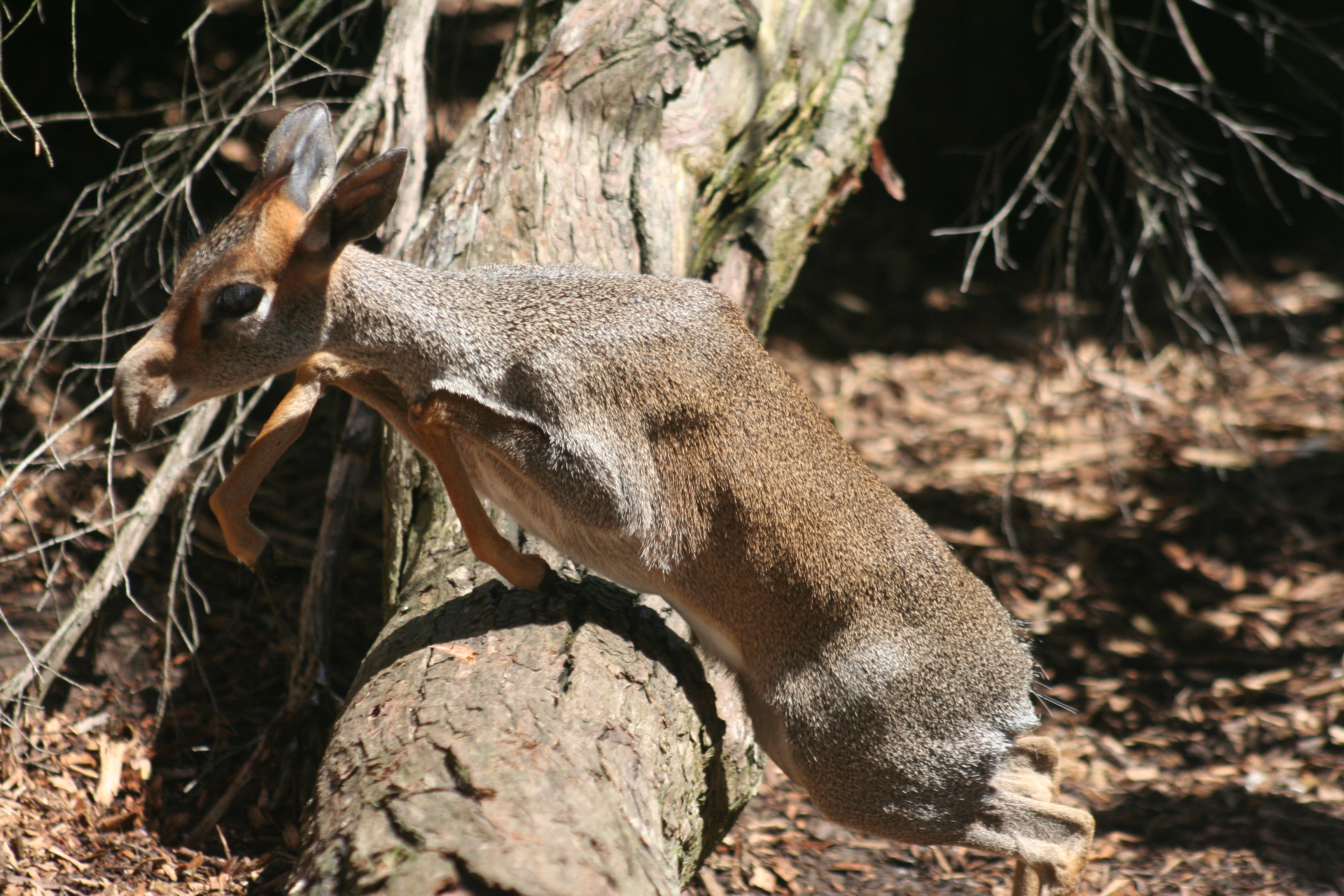 Dik-Dik